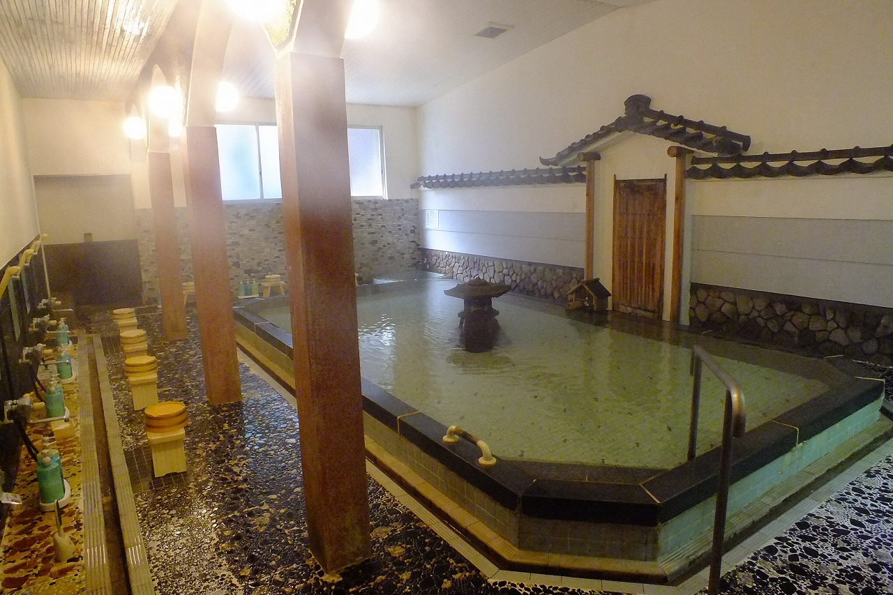 2015-10-01 Sioda-Onsen Ueyama Ryokan（湯元上山旅館）